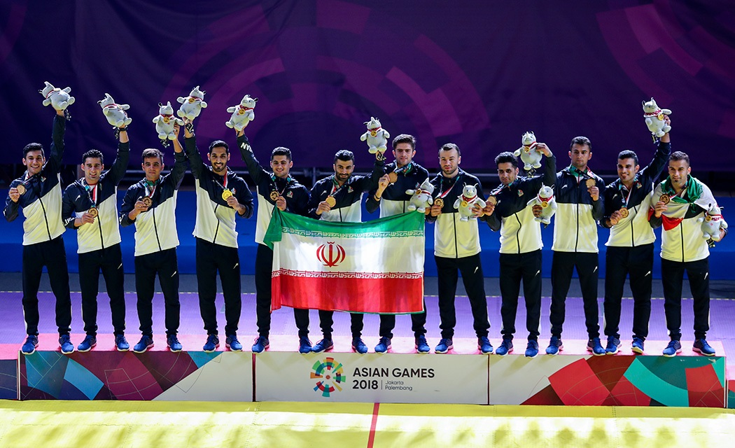 تیم ملی کبدی مردان ایران در بازیهای آسیایی جاکارتا ۲۰۱۸